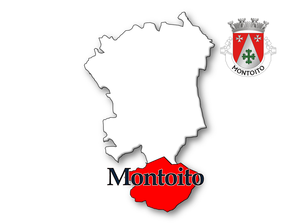 Evolução da População